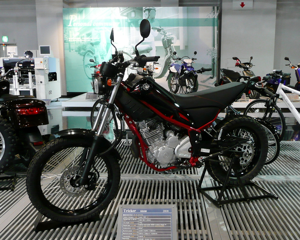 ヤマハ・トリッカー（2008年） ヤマハコミュニケーションプラザにて撮影